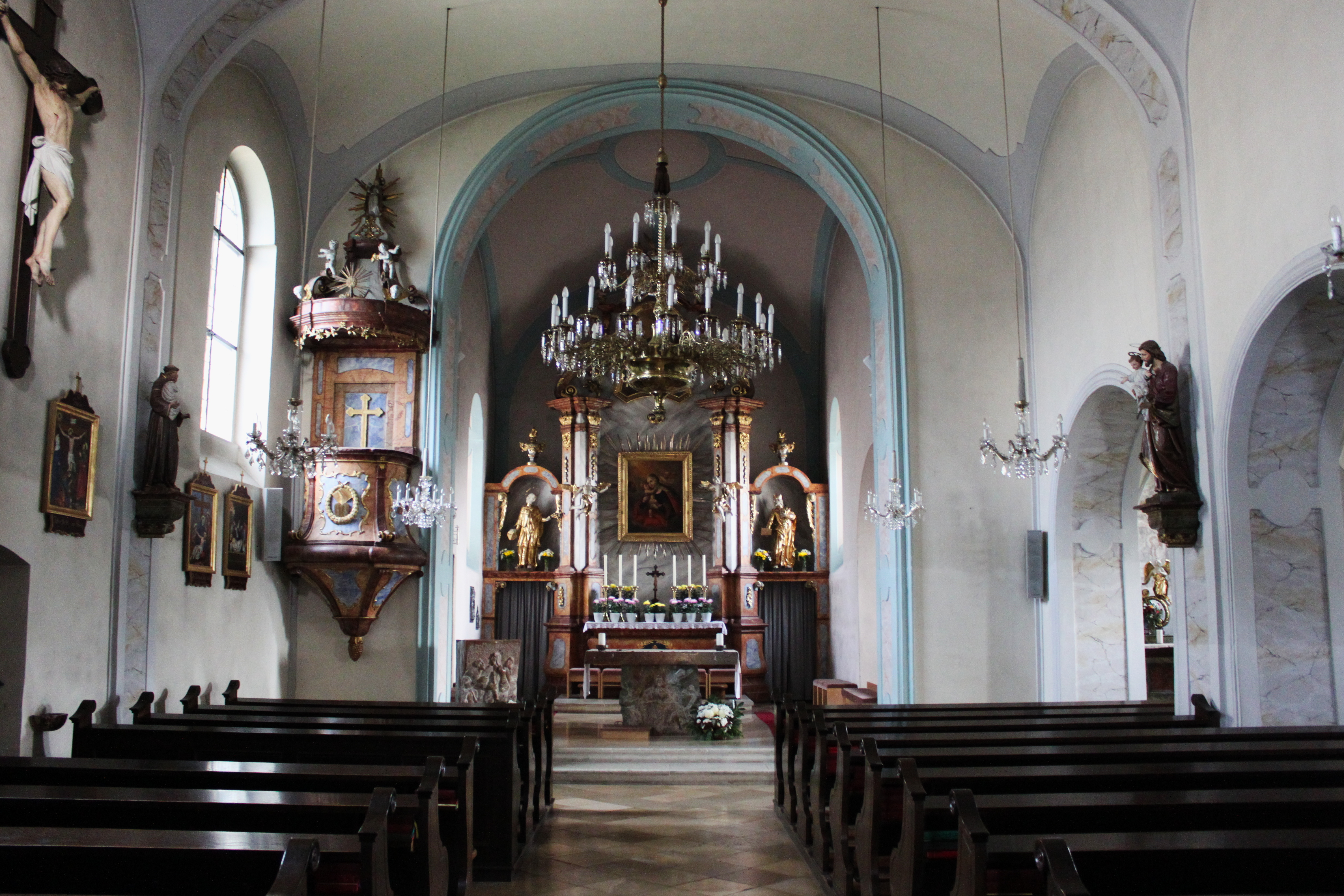 Nikolauskirche (Lanzenkirchen), Langhaus und Quadratchor, rechts mit zwei von drei Rundbogenöffnungen das Südschiff erkennbar